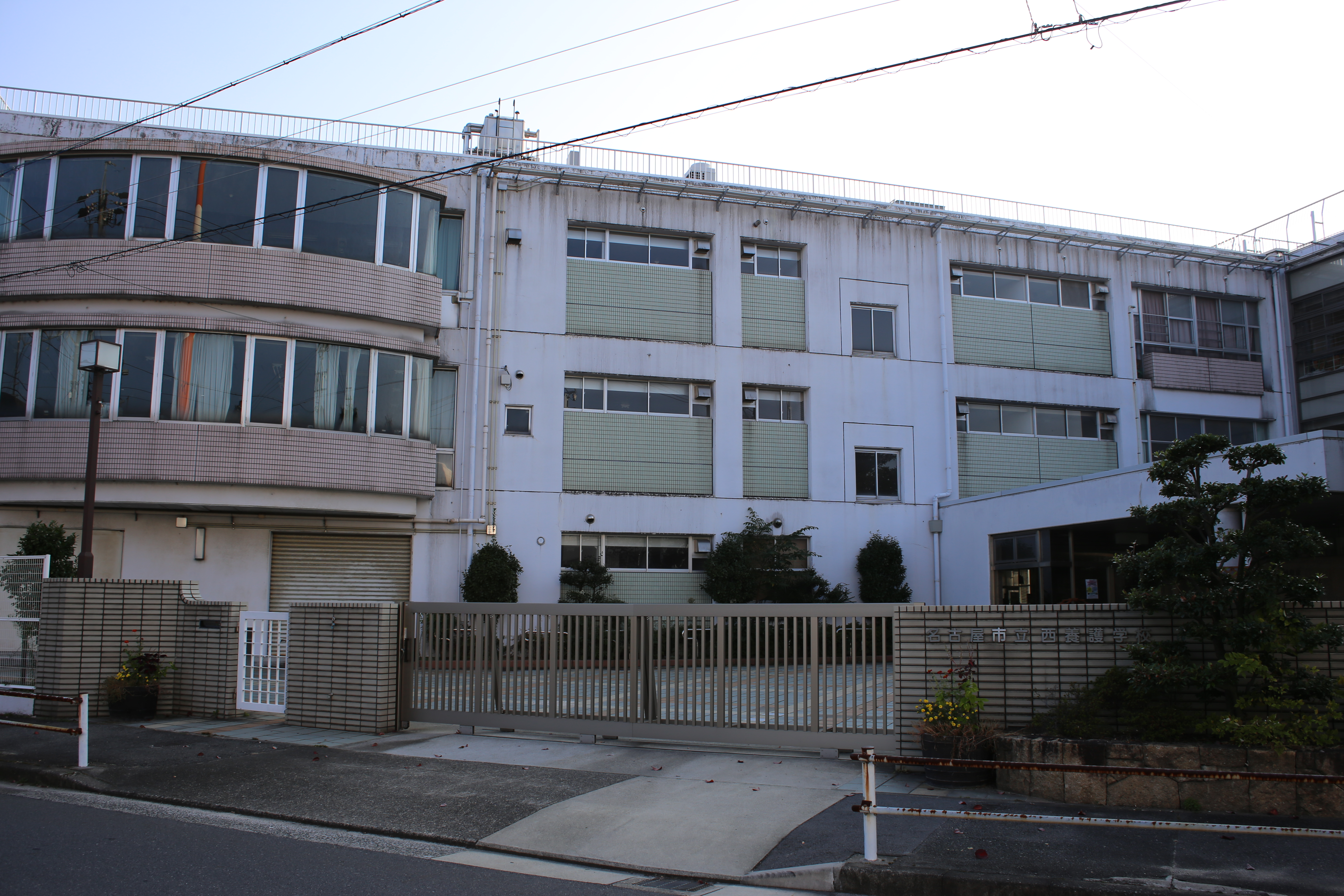 名古屋市中川区小本一丁目の名古屋市立西養護学校を北側公道東側より撮影